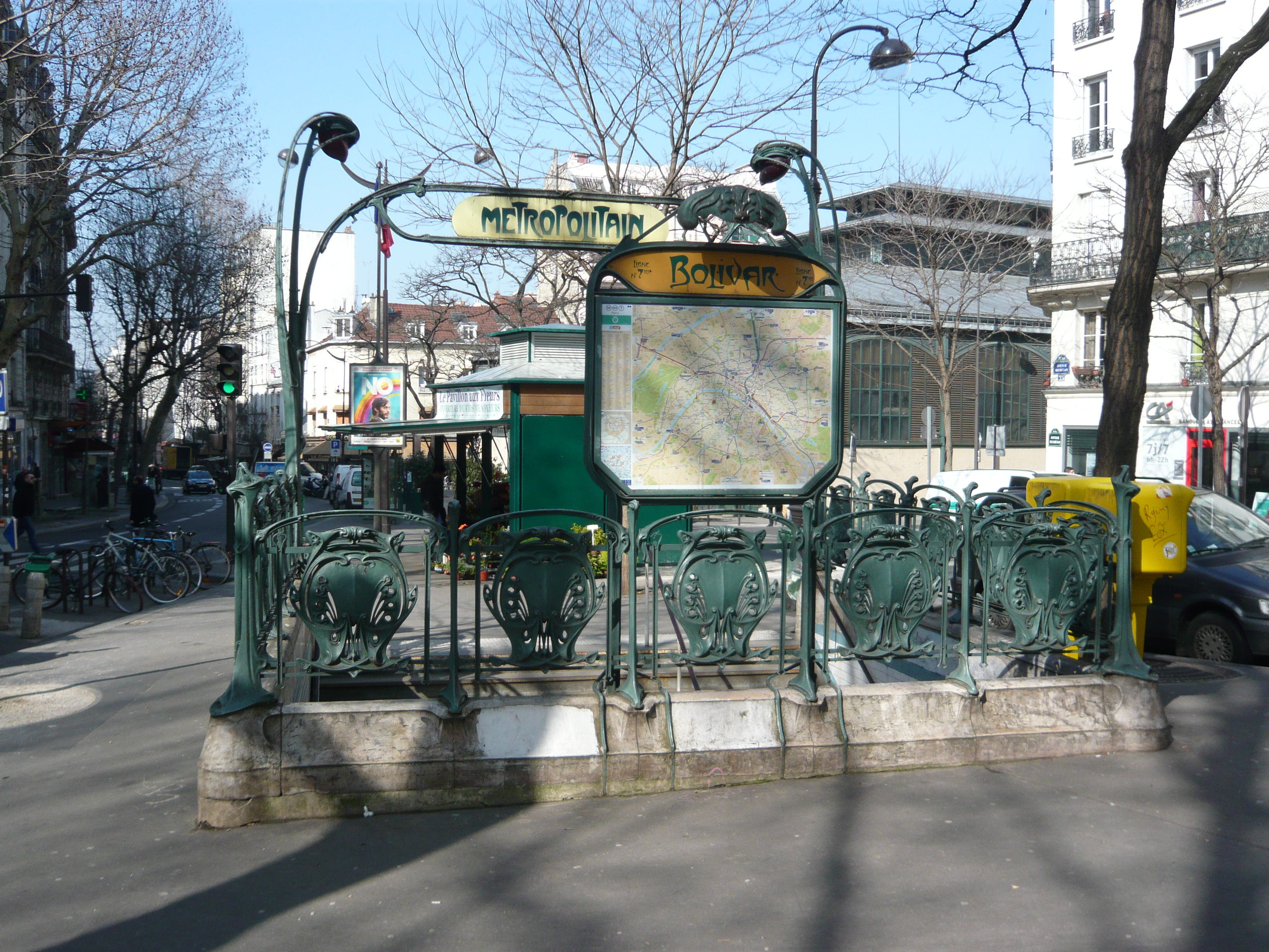 Edicule Guimard Station Bolivar